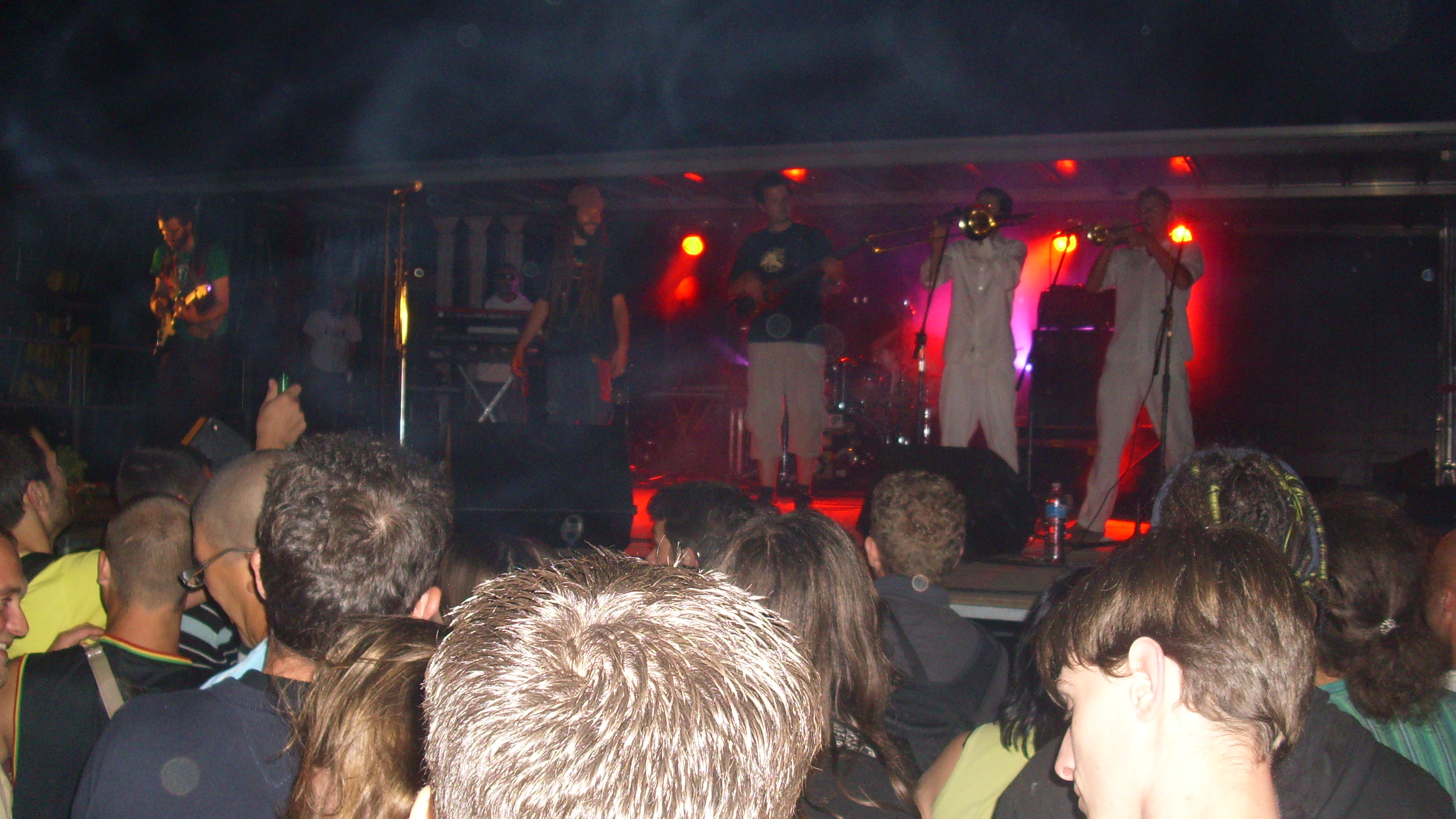 Danakil lors du festival de Verjux (71)